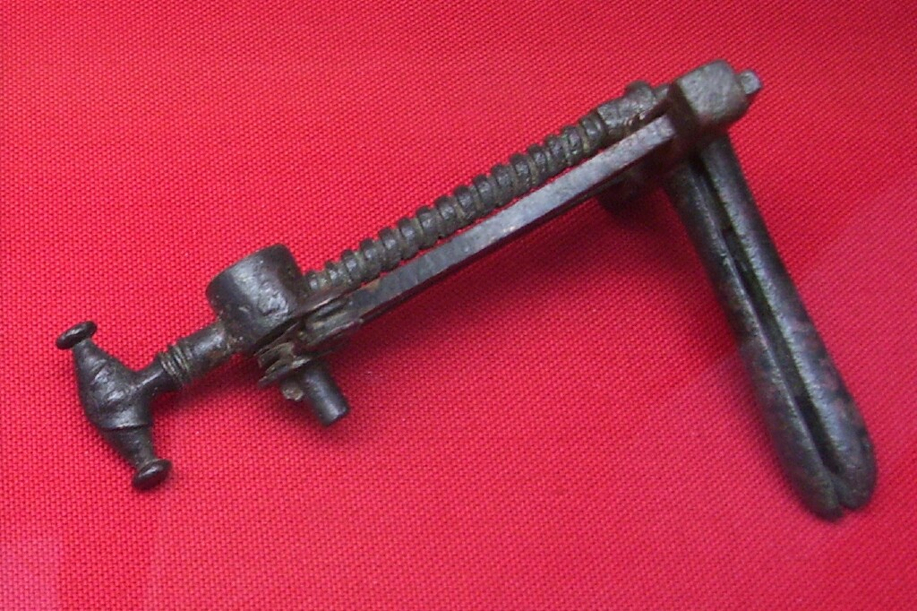 Speculum magnum matricis. Espéculo vaginal de bronce que data del periodo romano (Siglo I D.C) encontrado en una sepultura en Mérida, España y que es exhibido en el museo de esa ciudad.